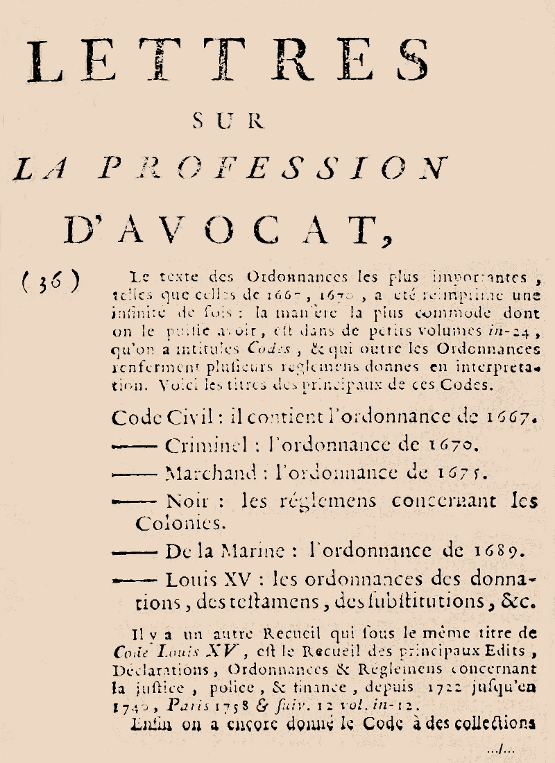 Définistion de "Code", extrait de "Armand-Gaston Camus, Lettres sur la profession d'avocat et sur les études nécessaires pour se rendre capable de l'exercer, J. Hérissant, 1772".